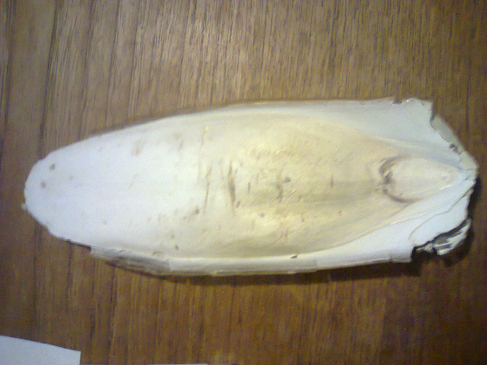 Skalblad fra en Sepiablæksprutte